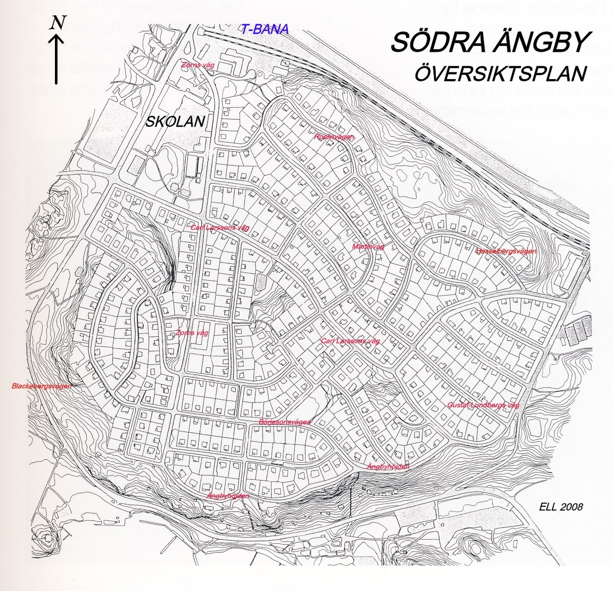 Södra Ängby, plankarta på området, Bromma stadsdelsområde